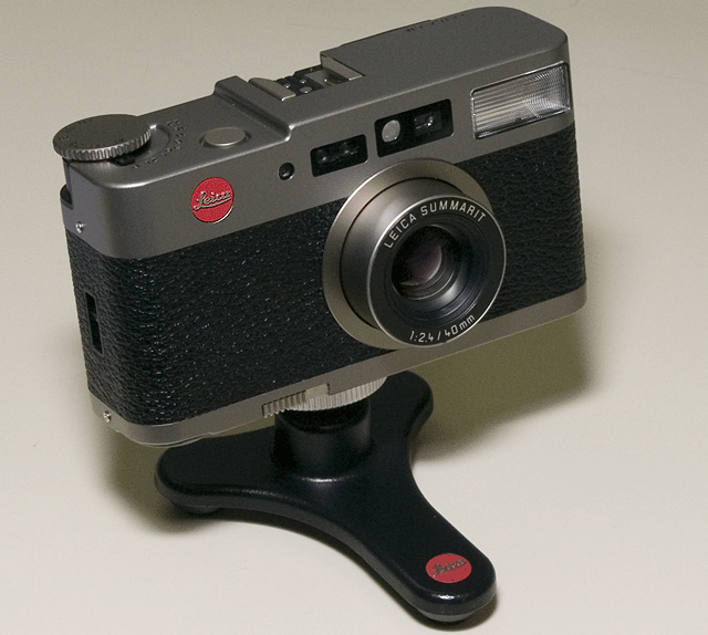 Leica CM